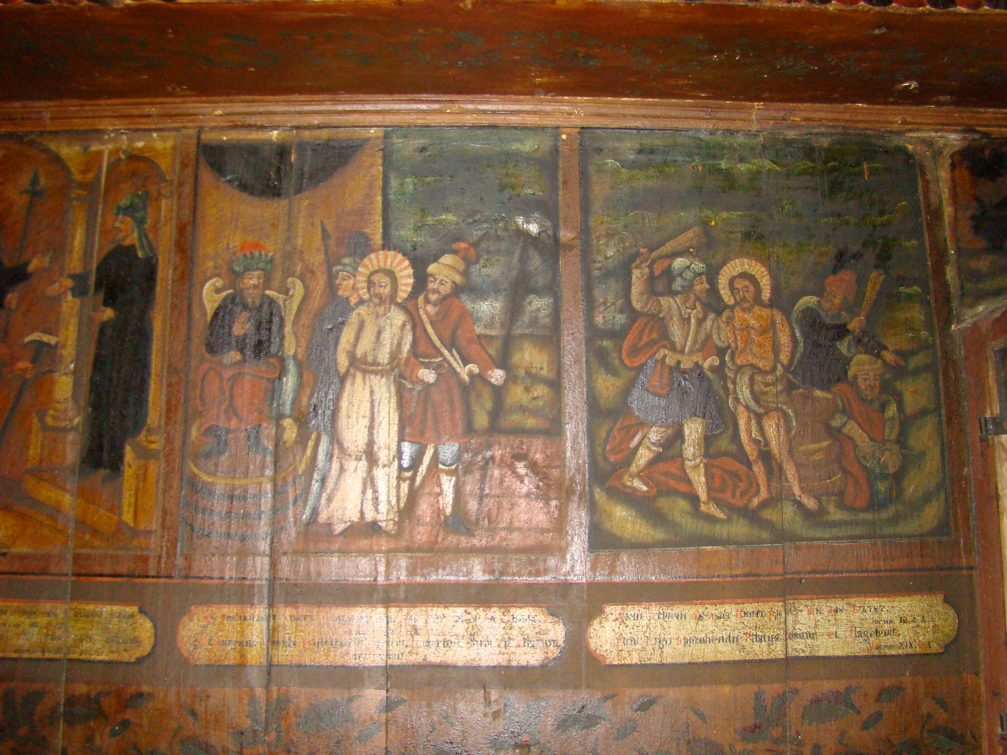 Biserica „Sf. Arhangheli Mihail și Gavriil” din Răstoci”, județul Sălaj